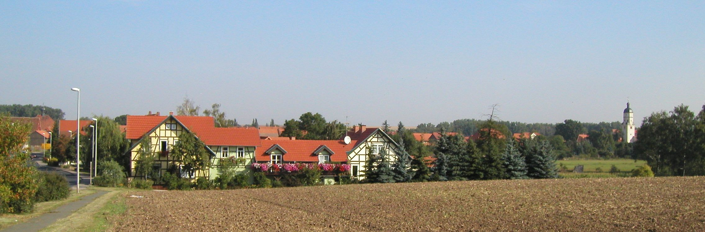 Wandersleben in Thüringen, Deutschland von Süden